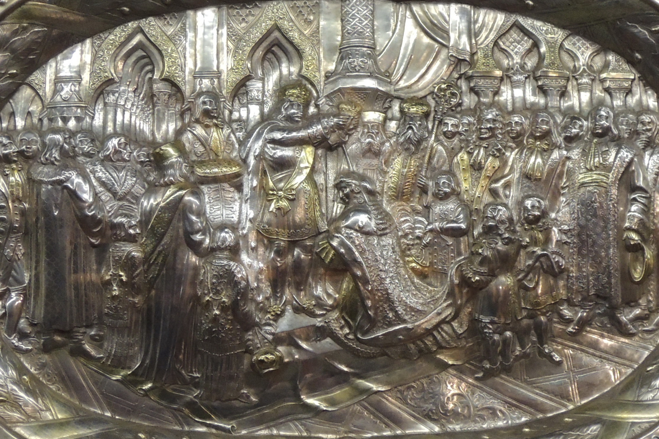 Блюдо "Коронация Екатерины I". Москва, 1724-1727. Мастер Николай Федоров. Серебро, чеканка, золочение. ММК На серебряном блюде изображен один из центральных моментов первой российской коронации, состоявшейся в Успенском соборе Московского Кремля 7 мая 1724 года: возложение Петром Великим императорской короны на жену Екатерину. Коленопреклоненная Екатерина представлена в парадном платье и отороченной горностаем мантии, которую поддерживают пажи. Мантию, впервые включенную в состав государственных регалий, выполнили специально для этой церемонии. Изображенный в руках Петра венец - первая российская императорская корона - также был создан для этой коронации. Слева за фигурой Петра изображен граф Я.В. Брюс с золоченой подушкой для короны в руках. Именно он внес новый символ монаршей власти в собор. Справа от императора два архиерея - вероятно, архиепископы Феодосий (Яновский), представленный в митре и с посохом в руках, и Феофан (Прокопович), которые подносят Петру коронационную мантию для возложения на Екатерину